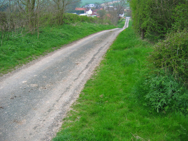 East Lutton